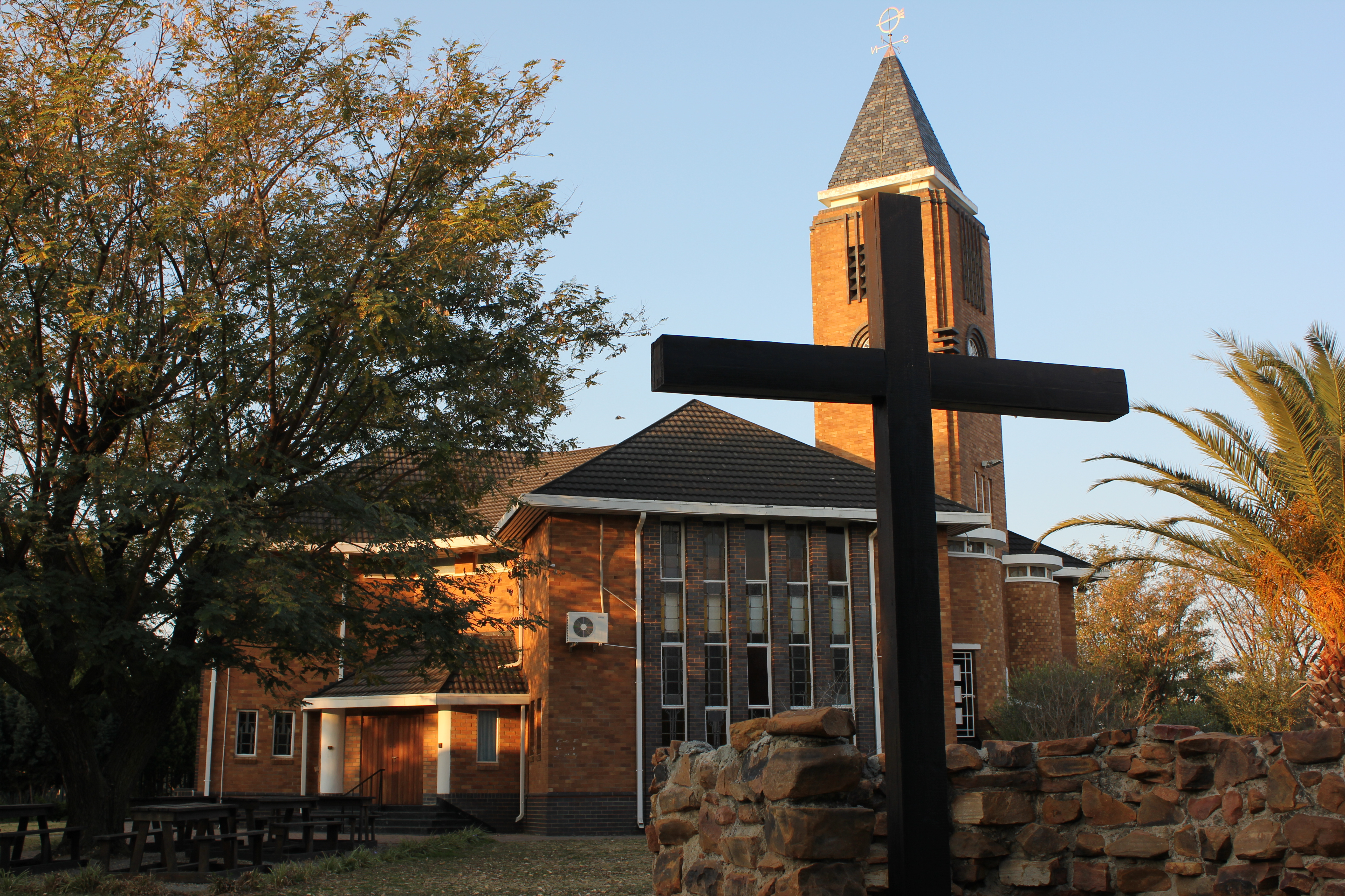 NG Kerk Odendaalsrus, Free State